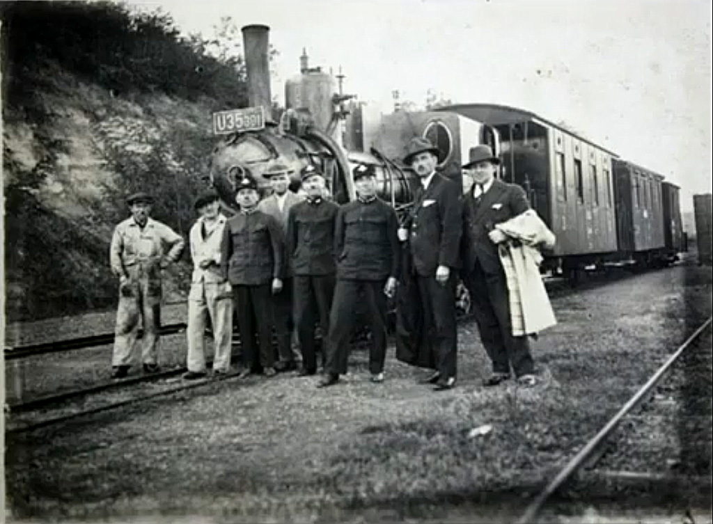 Локомотив серії U 35 на станції Хмільник